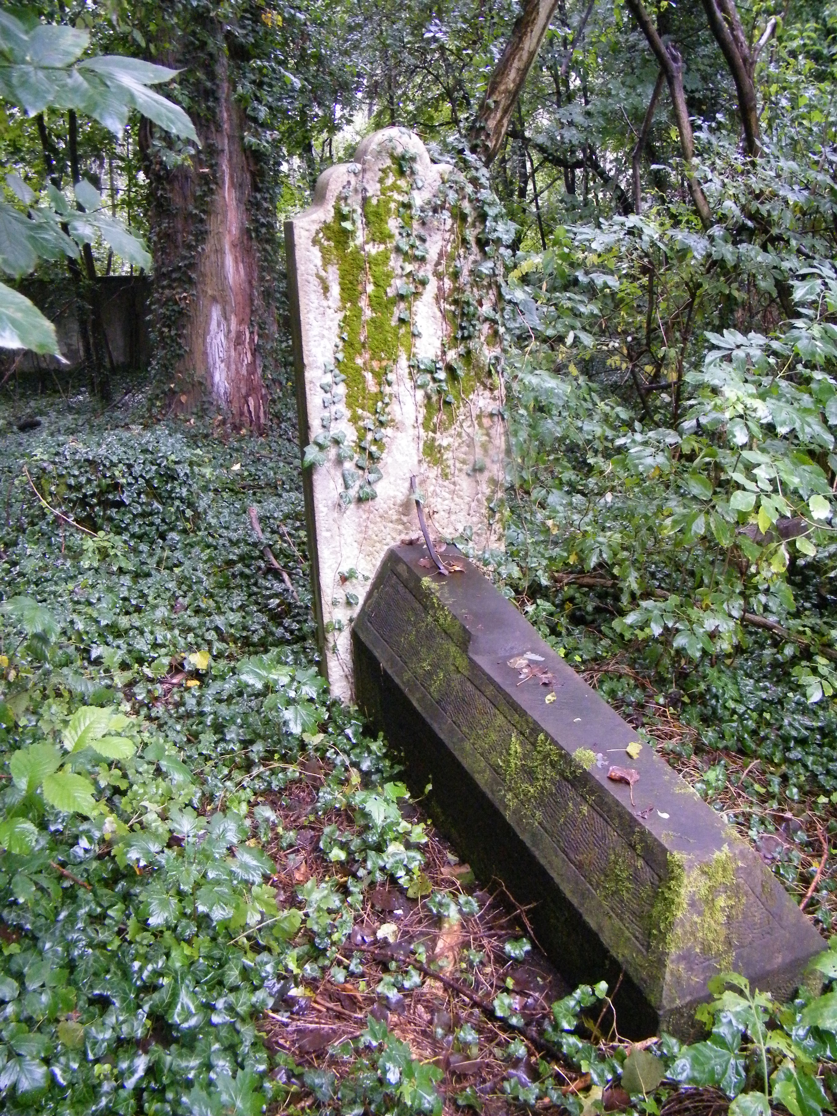 Częstochowa, ul. Złota - cmentarz żydowski (zabytek nr A-397/86 z 5.6.1986)